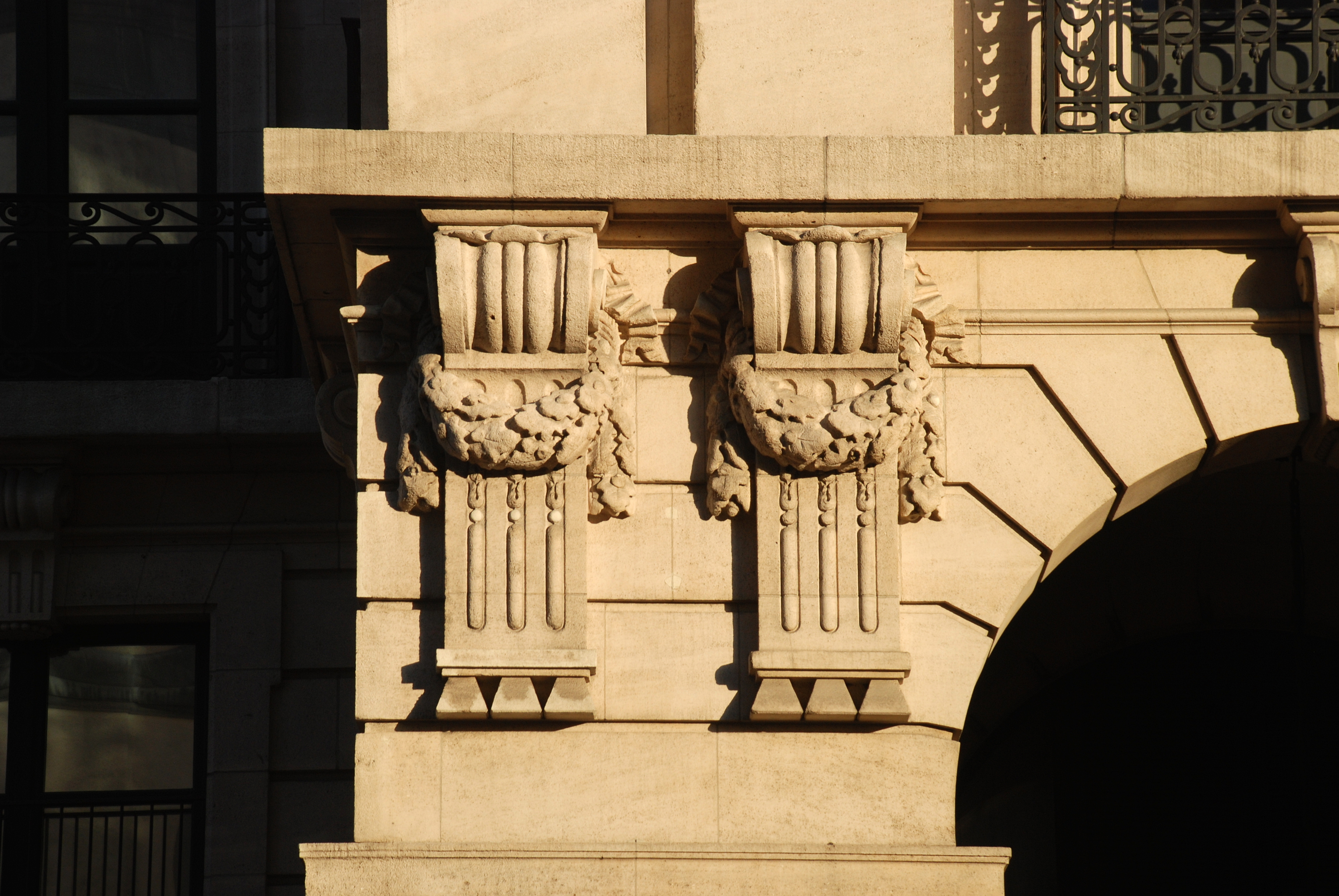 Belgique - Bruxelles - Triglyphes à gouttes de style éclectique